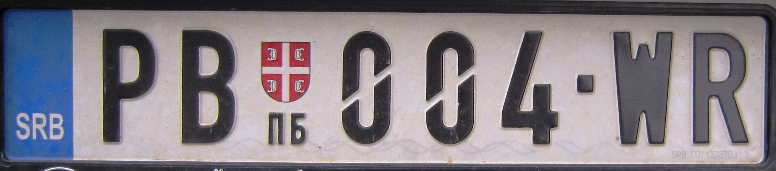 Servië kentekenplaat Priboj